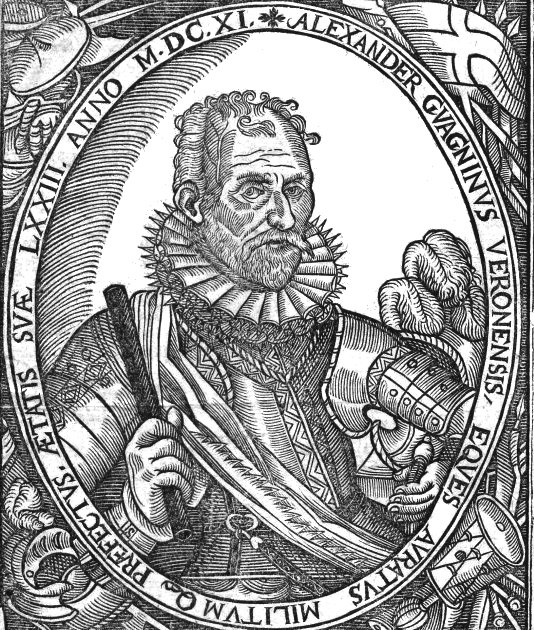 Alessandro Guagnini